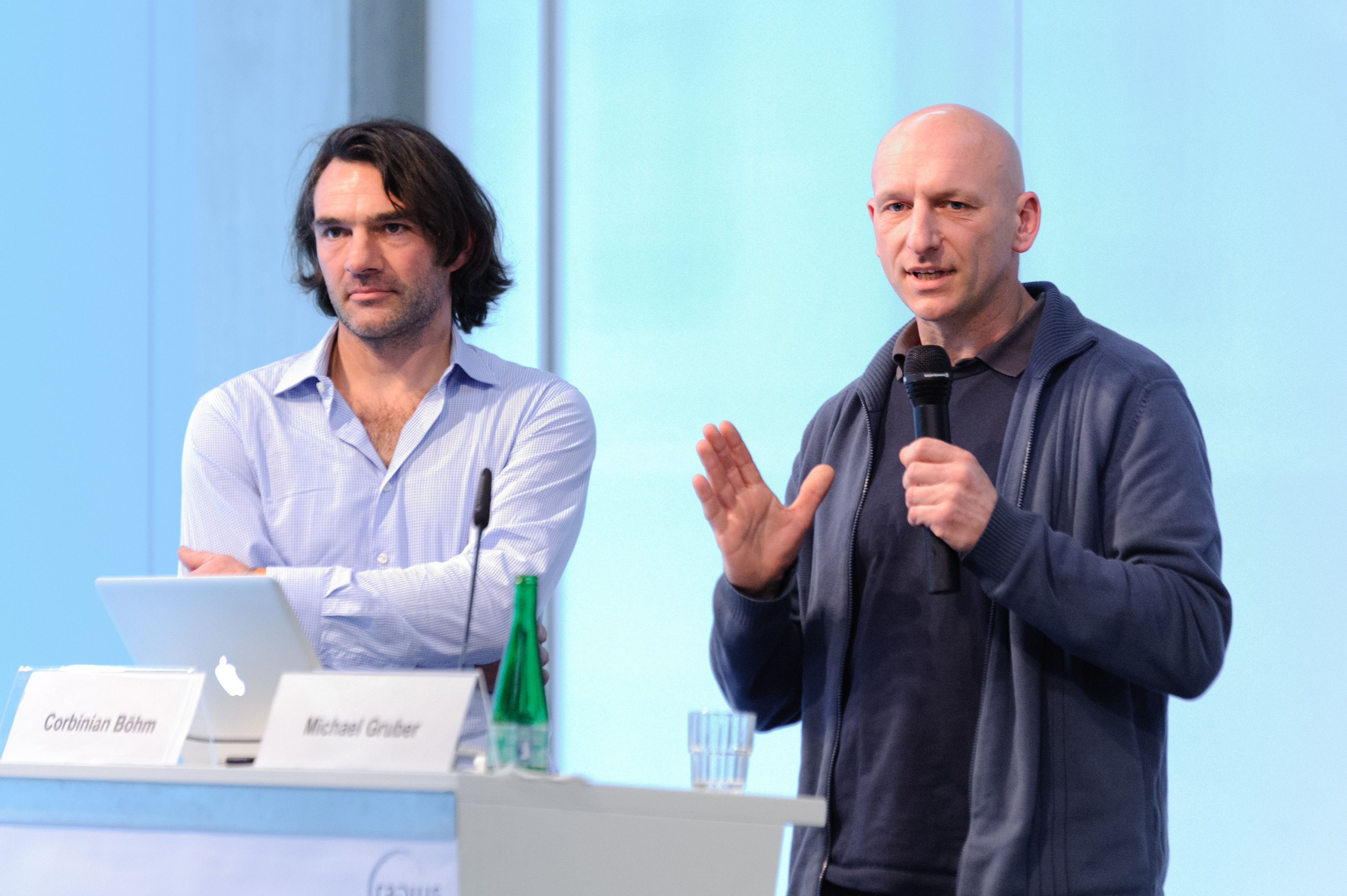 Corbinian Böhm and Michael Gruber (Visual Artists, Munich) ("Empfangshalle") Foto: Stephan Röhl Konferenz: Fremde Freunde?